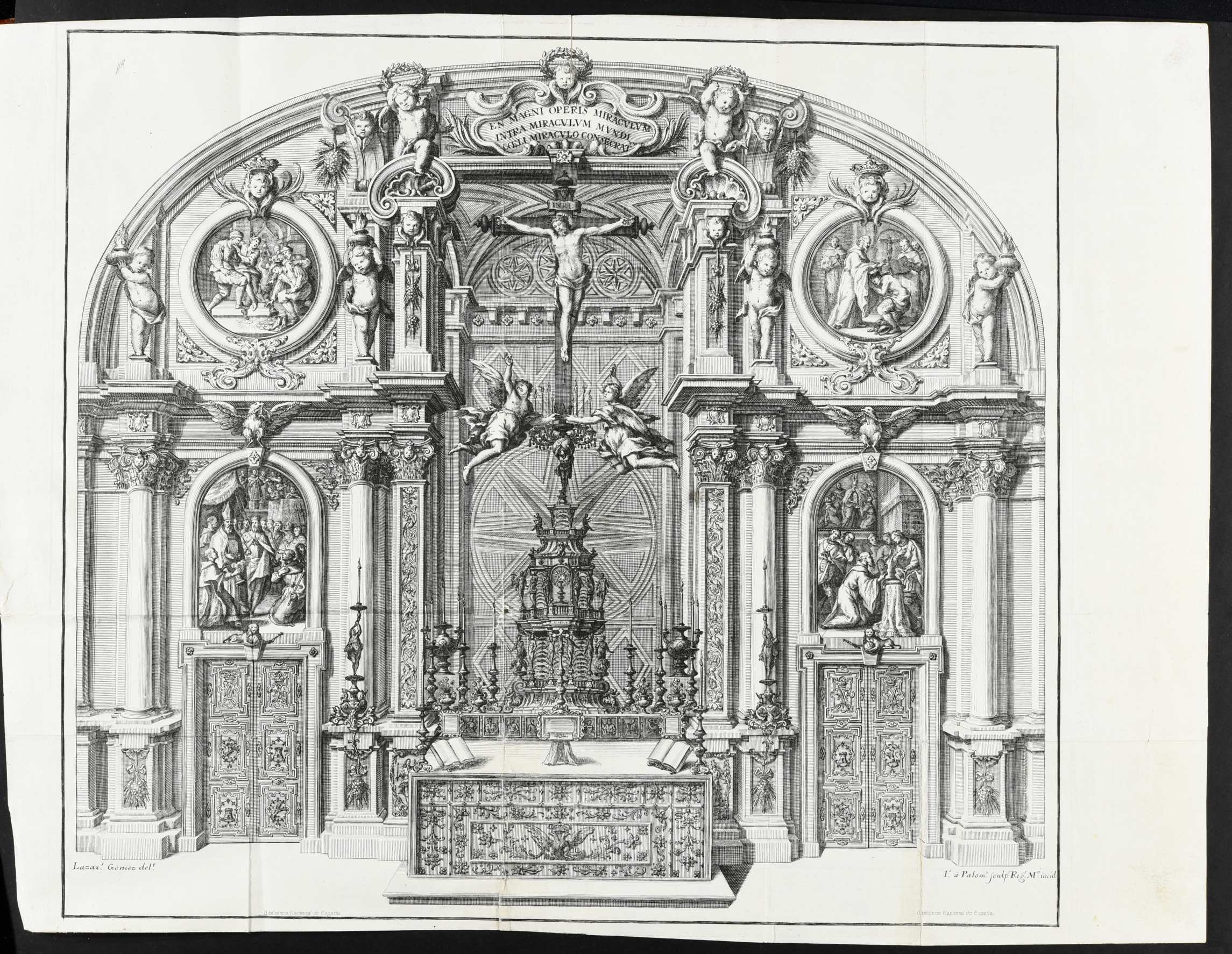 Retablo de la Santa Forma en la Sacristía del Monasterio de El Escorial / Lázaro Gómez delt.; Is. a Palomo. sculpr. Regs. Mti. incid. [Madrid: s.n., 1764]. Descripción del Real Monasterio de San Lorenzo del Escorial / compendiada de la obra de Francisco de los Santos y coronada por un apéndice por Fray Andrés Ximenes. Madrid, 1764.